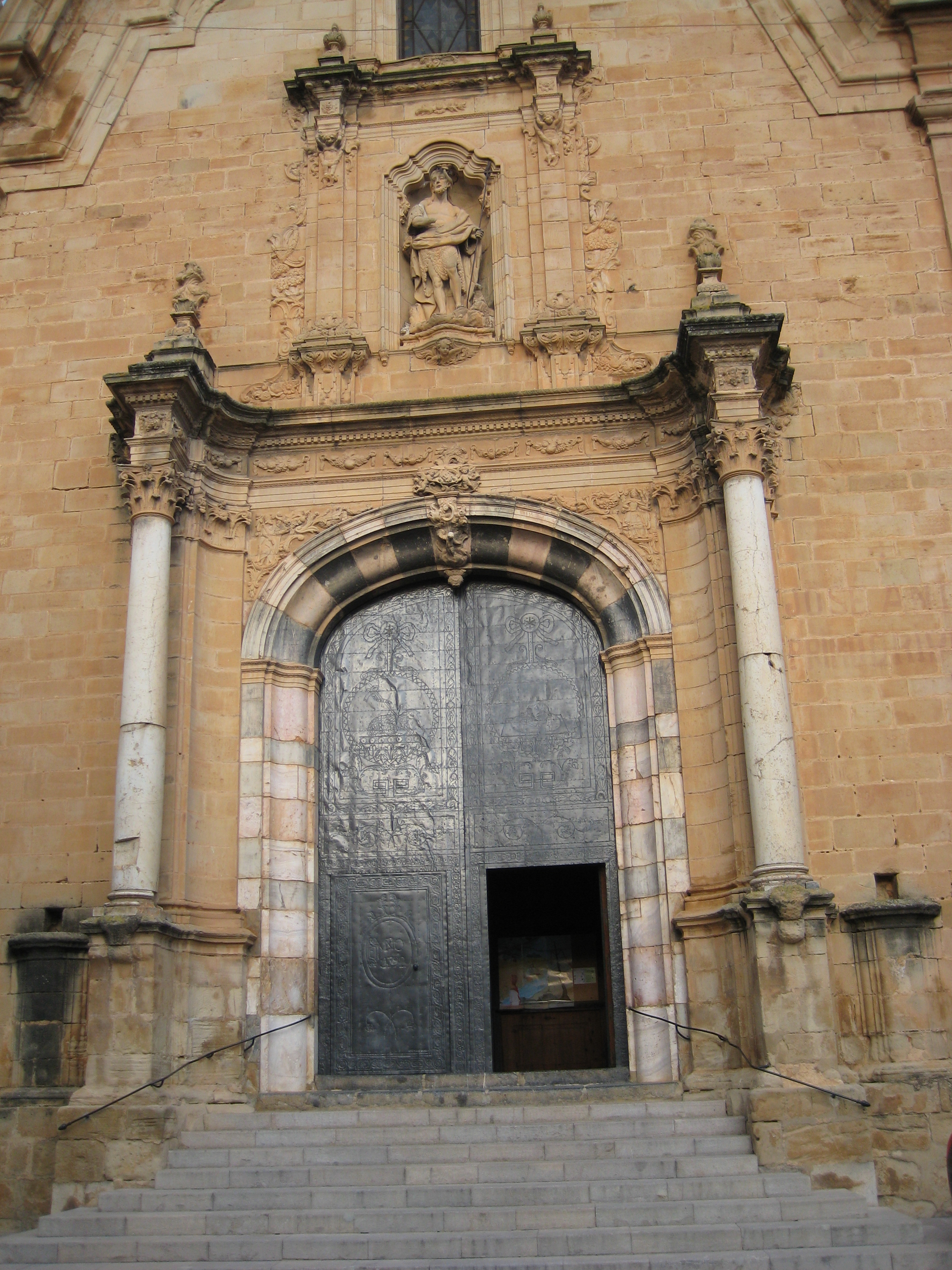 Portada de l'església de Sant Joan Baptista de Cabanes (Plana Alta)